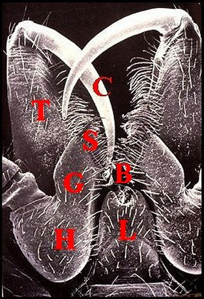 Vue ventrale des pièces péri-buccales chez une Araignée Aranéomorphe